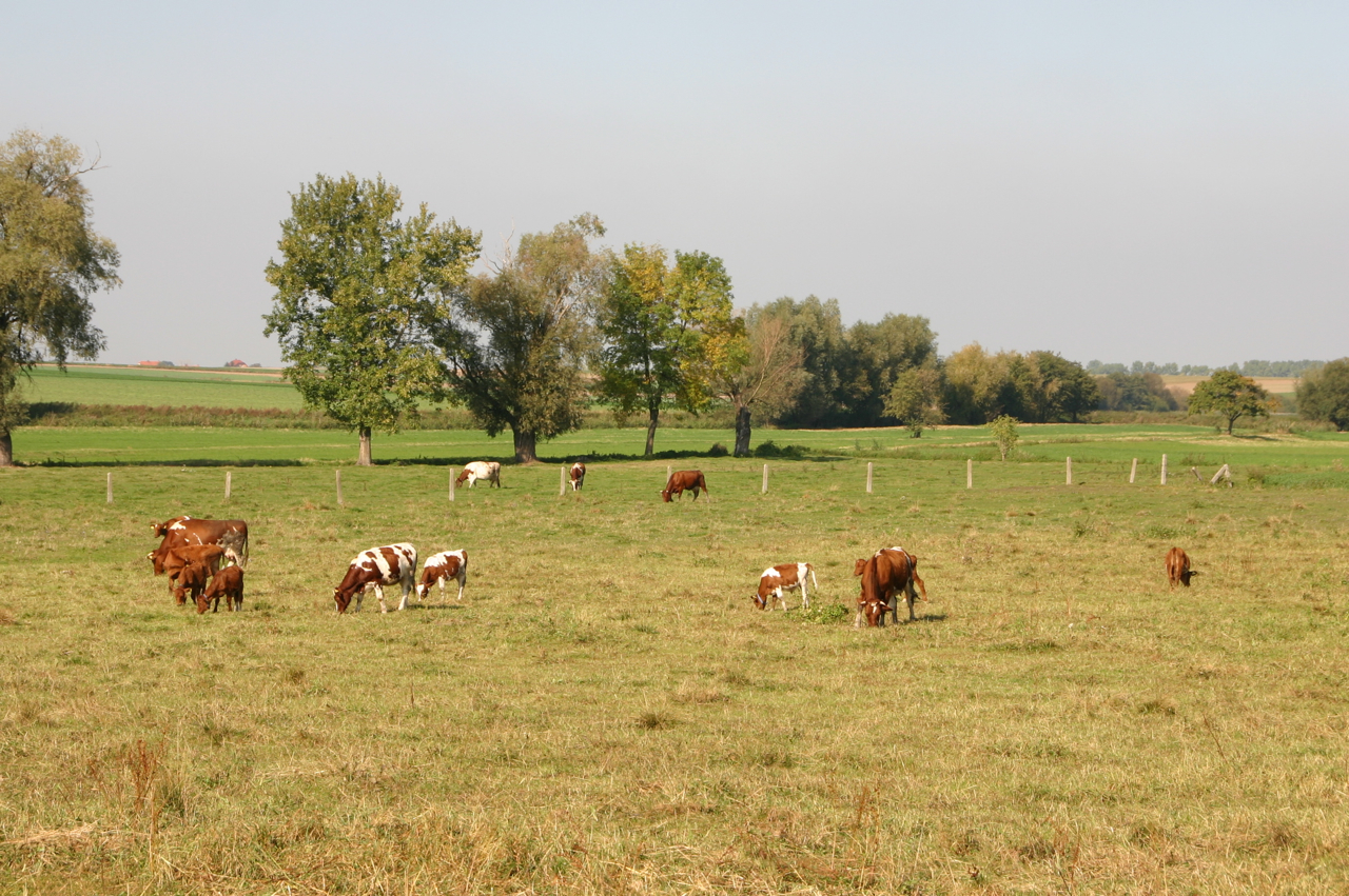 Naczęsławice (dawna Groß Nimsdorf) – wieś w Polsce położona w województwie opolskim, w powiecie kędzierzyńsko-kozielskim, w gminie Pawłowiczki.